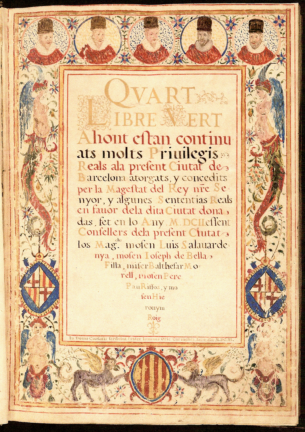 Llibre Vert, volum 4 (1.346-1.370)